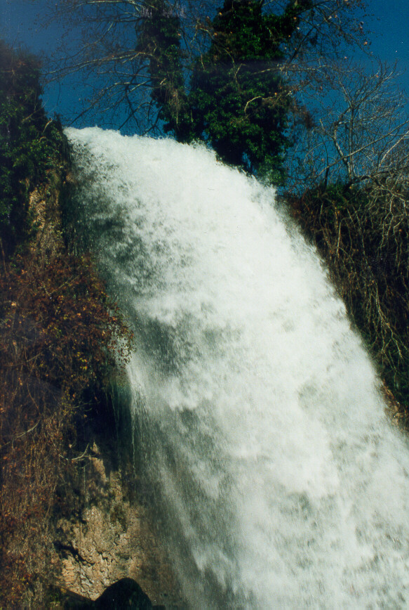 Edessa Makedonien Nordgriechenland / Katarakt.